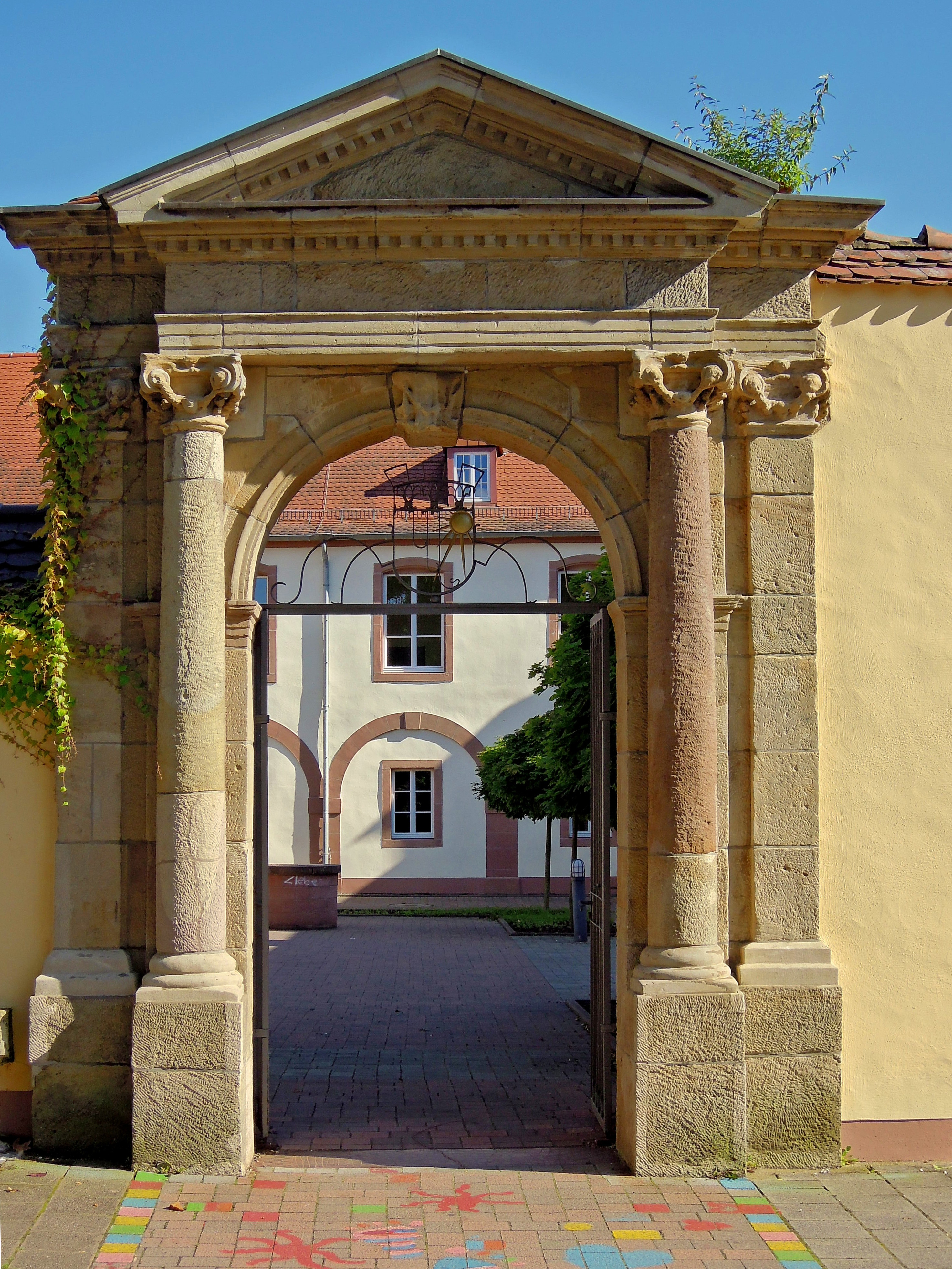 Augustinerinnen-Kloster, Kirche, Kreuzgangmauern 1906 (Einzeldenkmal)